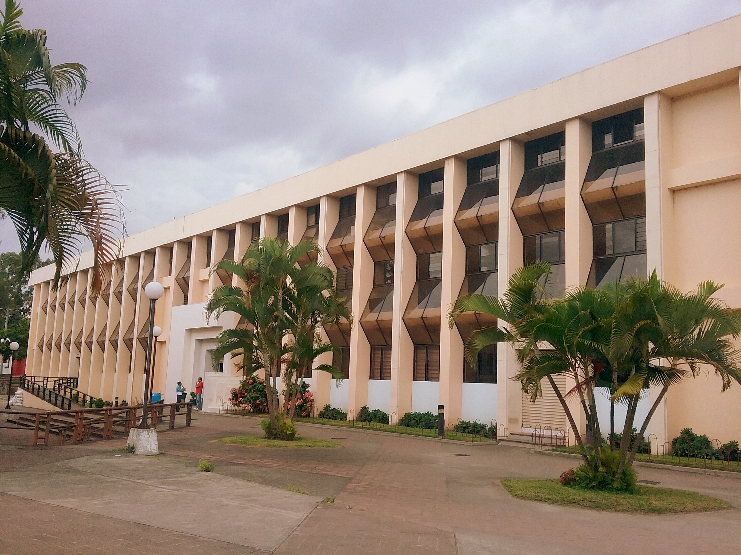 Edificio de los laboratorios de la Facultad de Odontología de la Universidad de El Salvador.